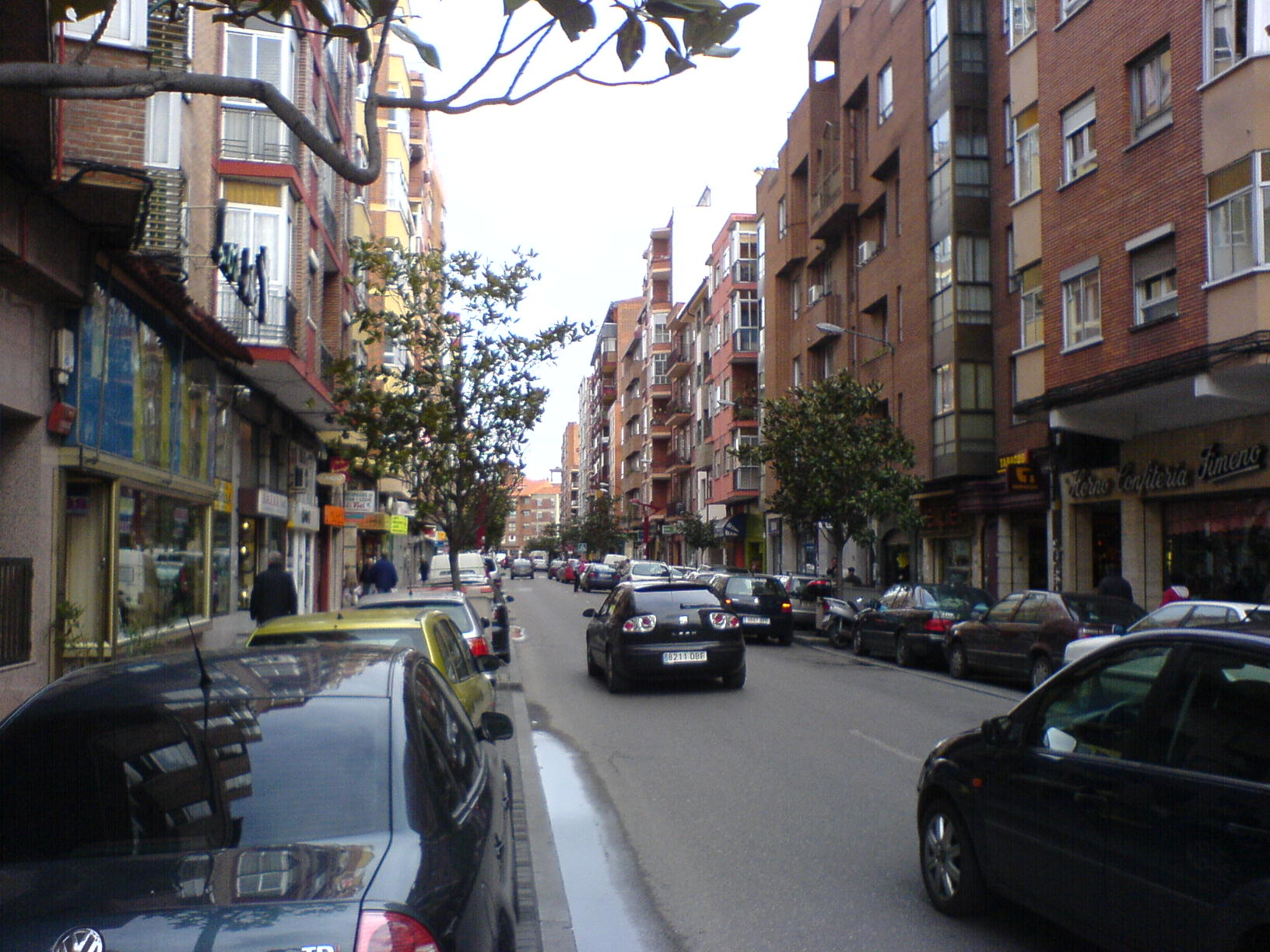 Avda Segovia, Las Delicias